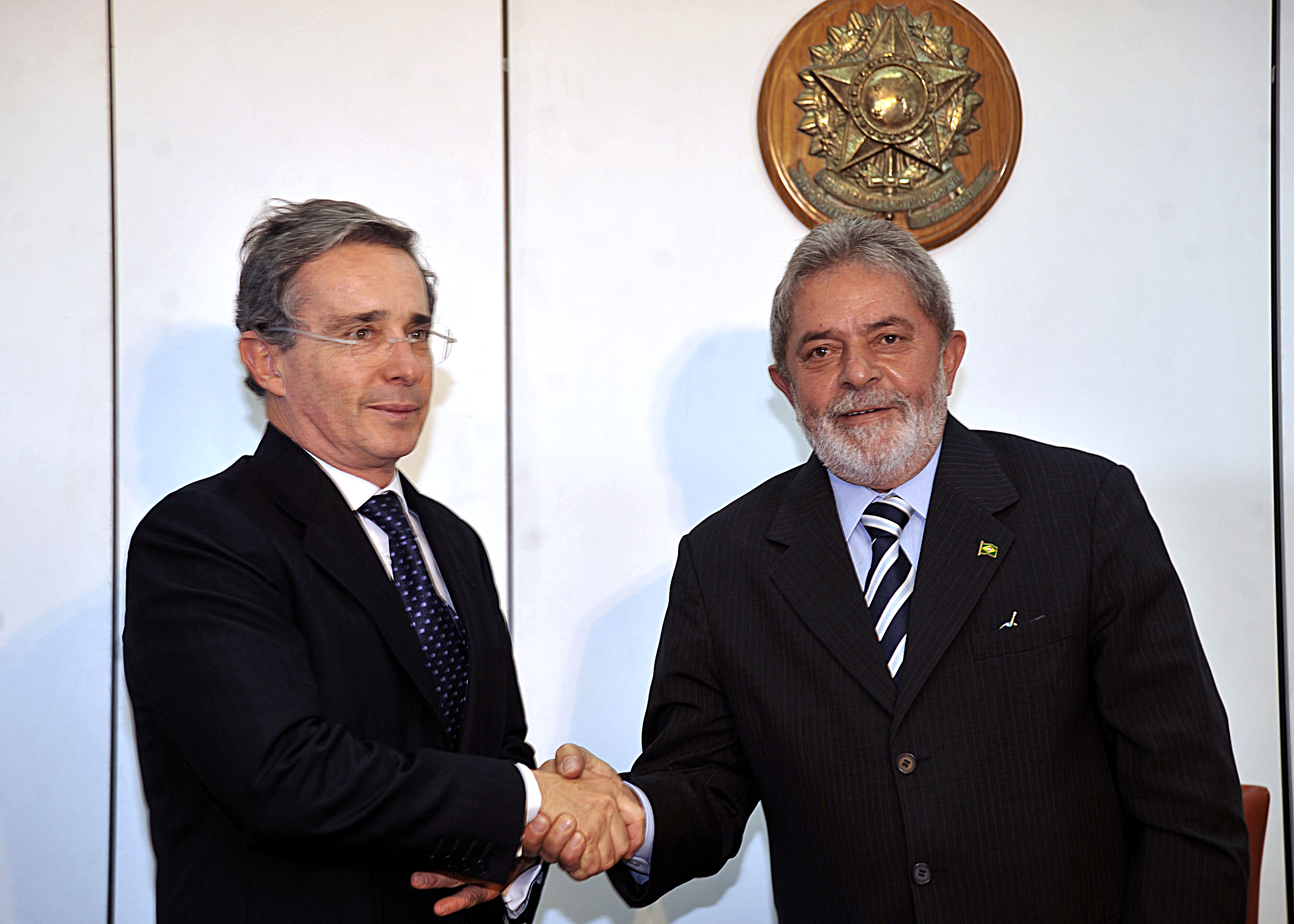 O presidente Lula recebe a visita do presidente da Colômbia, Álvaro Uribe.